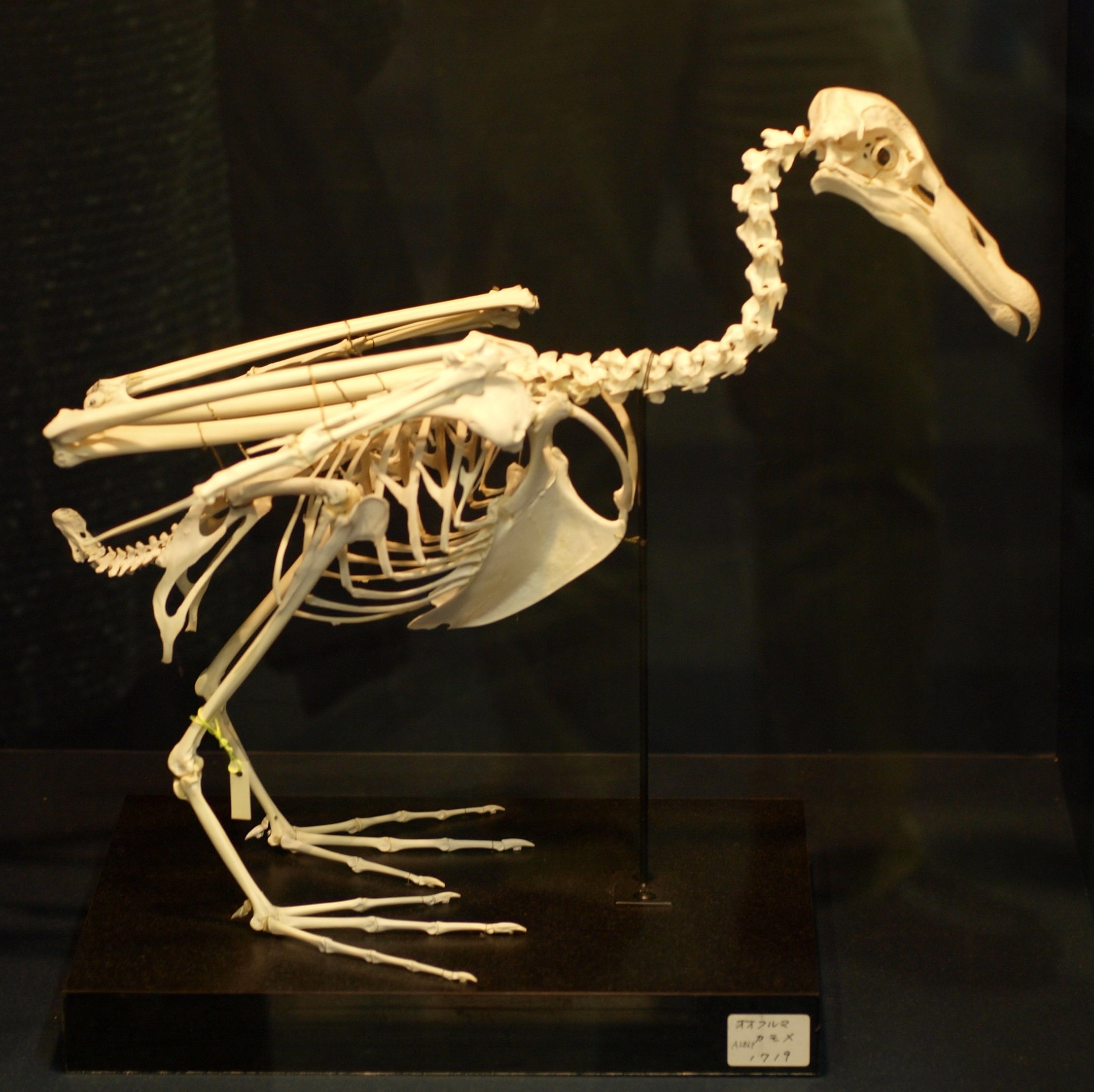 オオフルマカモメ Southern Giant-petrel Domain: Eukaryota • Regnum: Animalia • Phylum: Chordata • Subphylum: Vertebrata • Infraphylum: Gnathostomata • Superclassis: Tetrapoda • Classis: Aves • Ordo: Procellariiformes • Familia: Procellariidae • Genus: Macronectes Wikispecies has an entry on: Macronectes giganteus. Species Macronectes giganteus (Gmelin, 1789) 動物界 脊索動物門 鳥綱 ミズナギドリ目 ミズナギドリ科 Macronectes属 Location: Osaka Aquarium Kaiyukan, Japan Other photos: NCBI Taxonomy ID:37057 ITIS link: Macronectes giganteus (Gmelin, 1789) (mirror) EOL link: Macronectes giganteus uBio search link: Macronectes giganteus